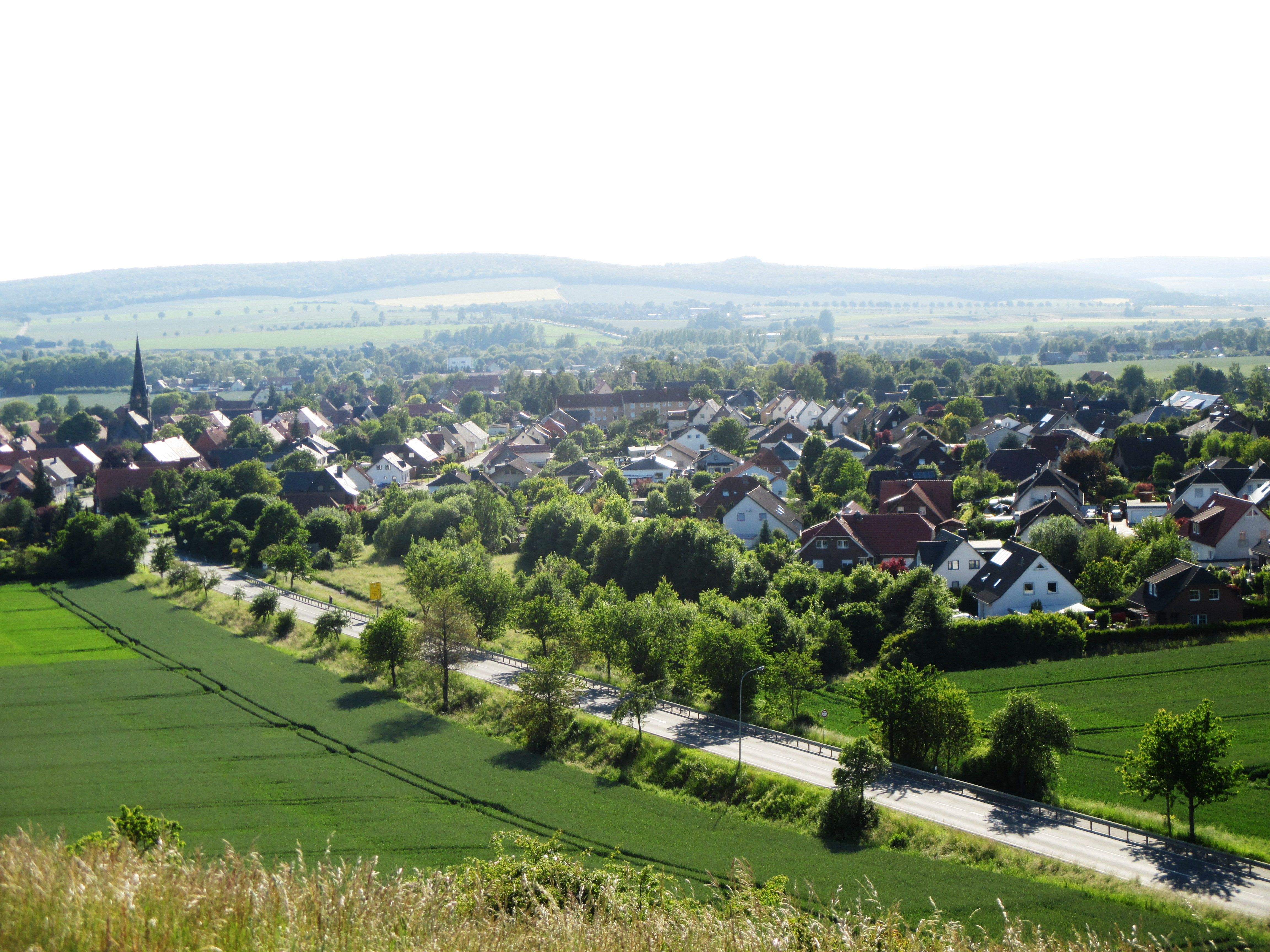 Blick vom Flöteberg auf den Ortskern von Othfresen, Gemeinde Liebenburg